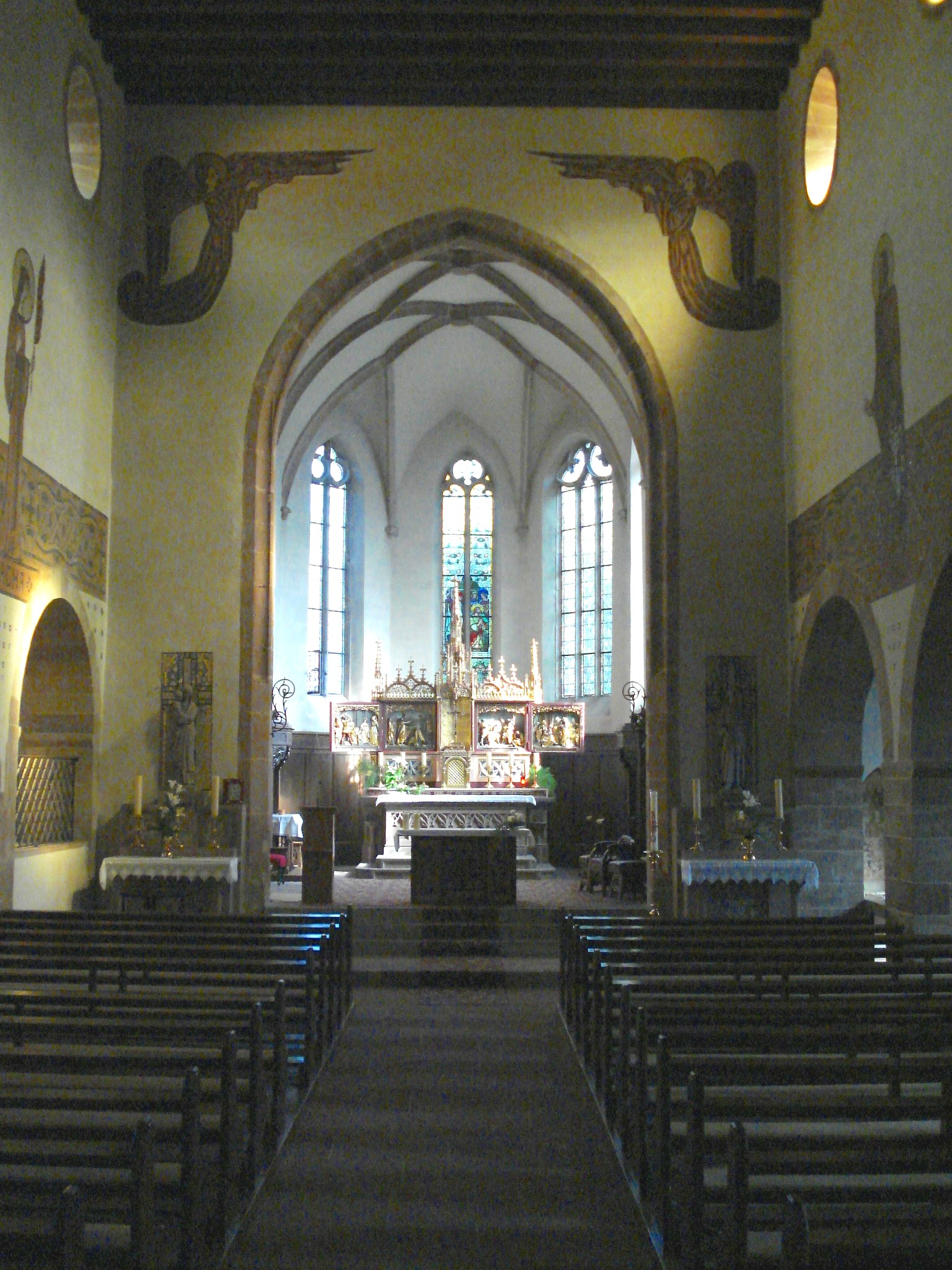 Wattwiller Eglise Nef centrale et choeur